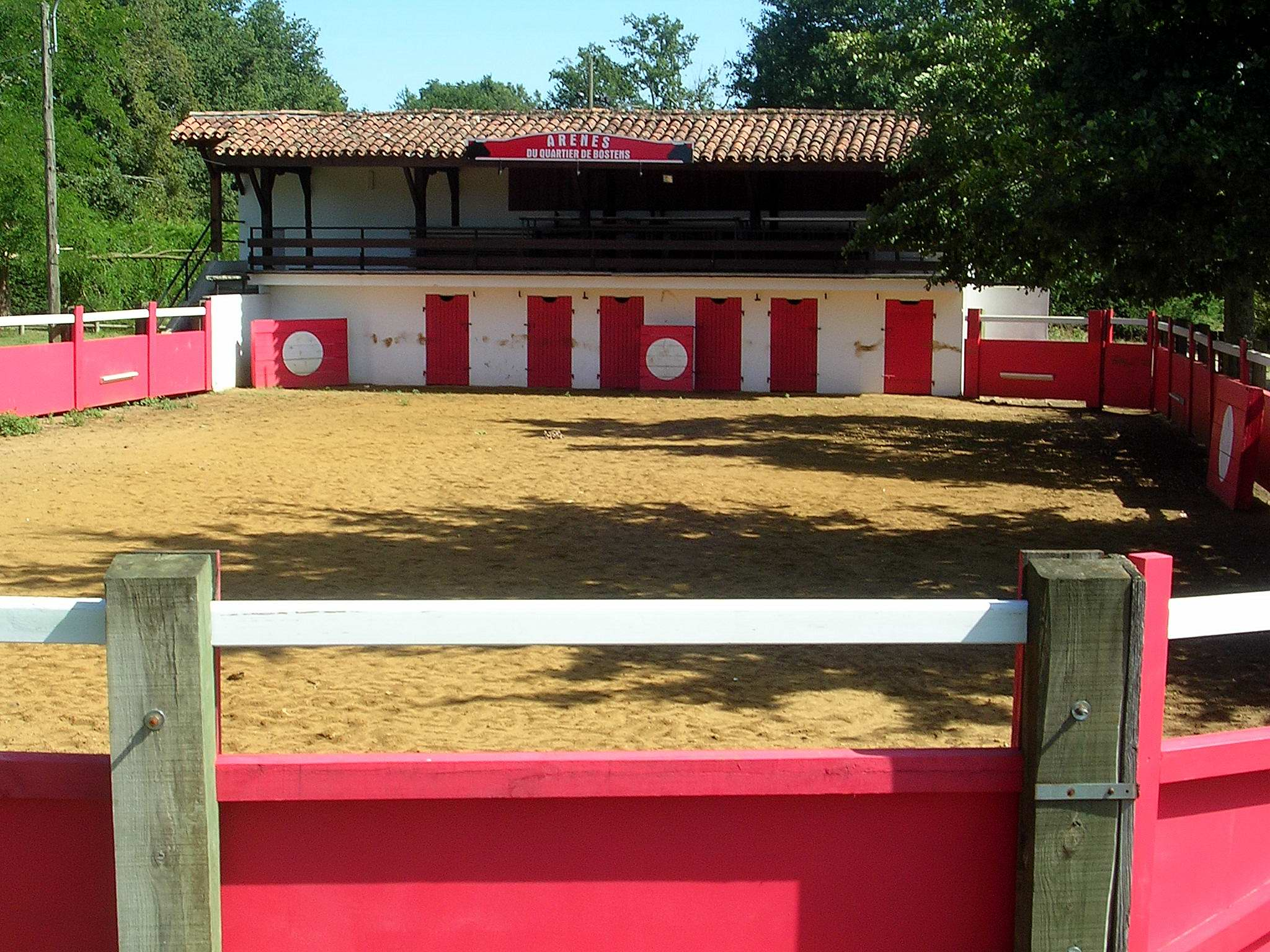 Arènes de Bostens à Bascons, dans le département français des Landes